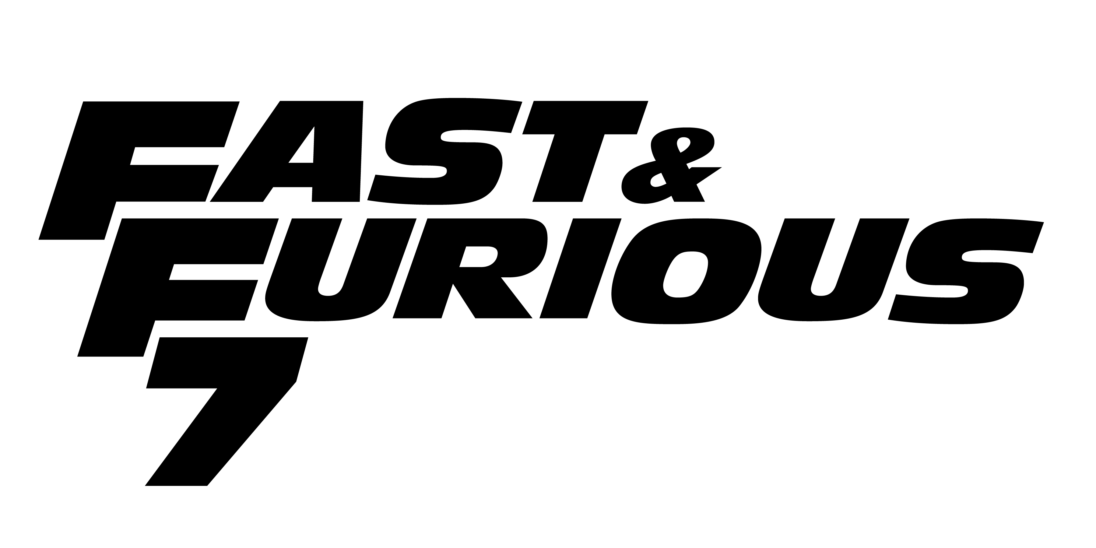 Logo de Fast and Furious 7